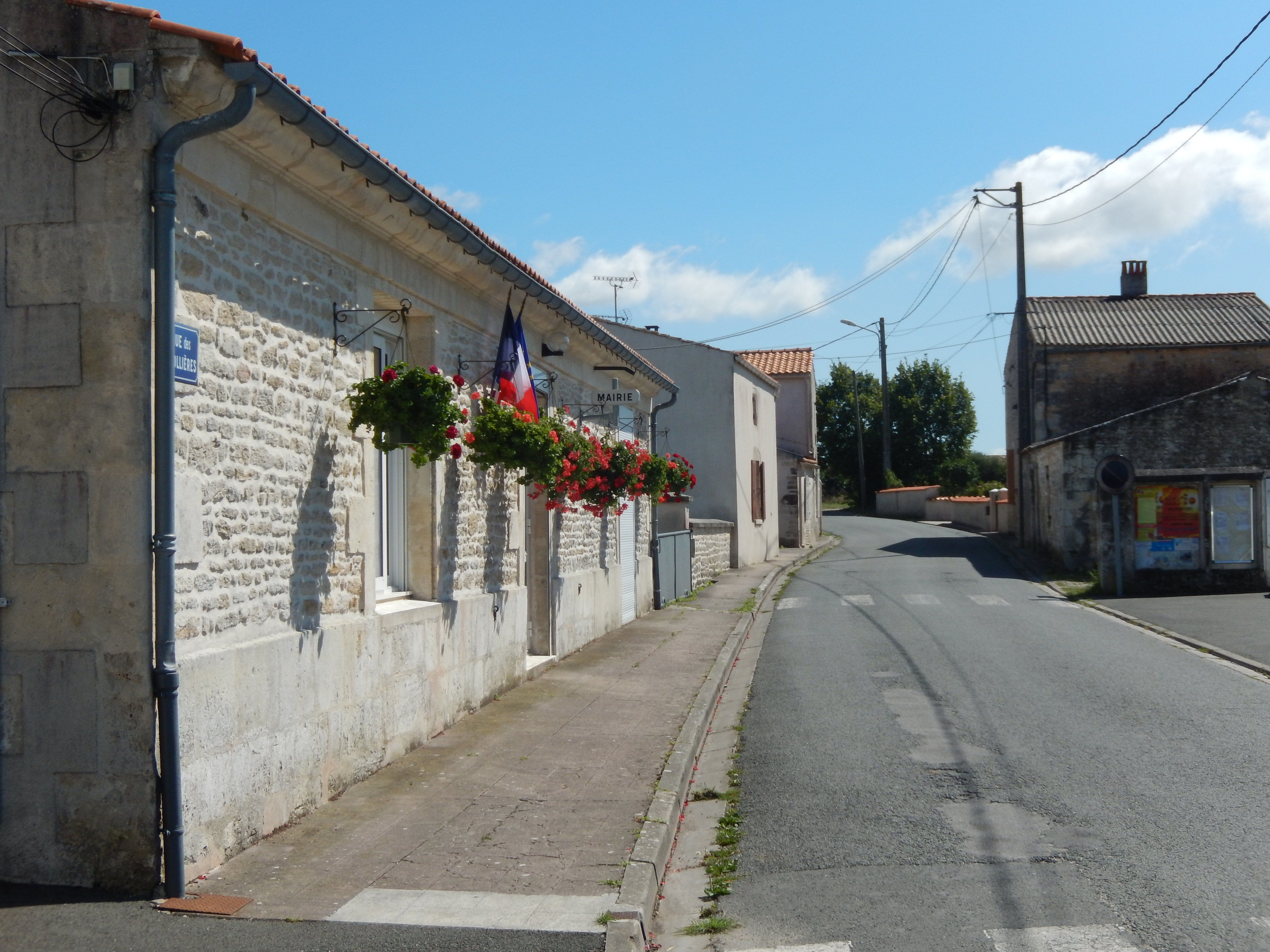 Beaugeay, Charente-Maritime, France. • La rue des Ridollières à Beaugeay, avec, à gauche de l'image, la mairie de la commune.